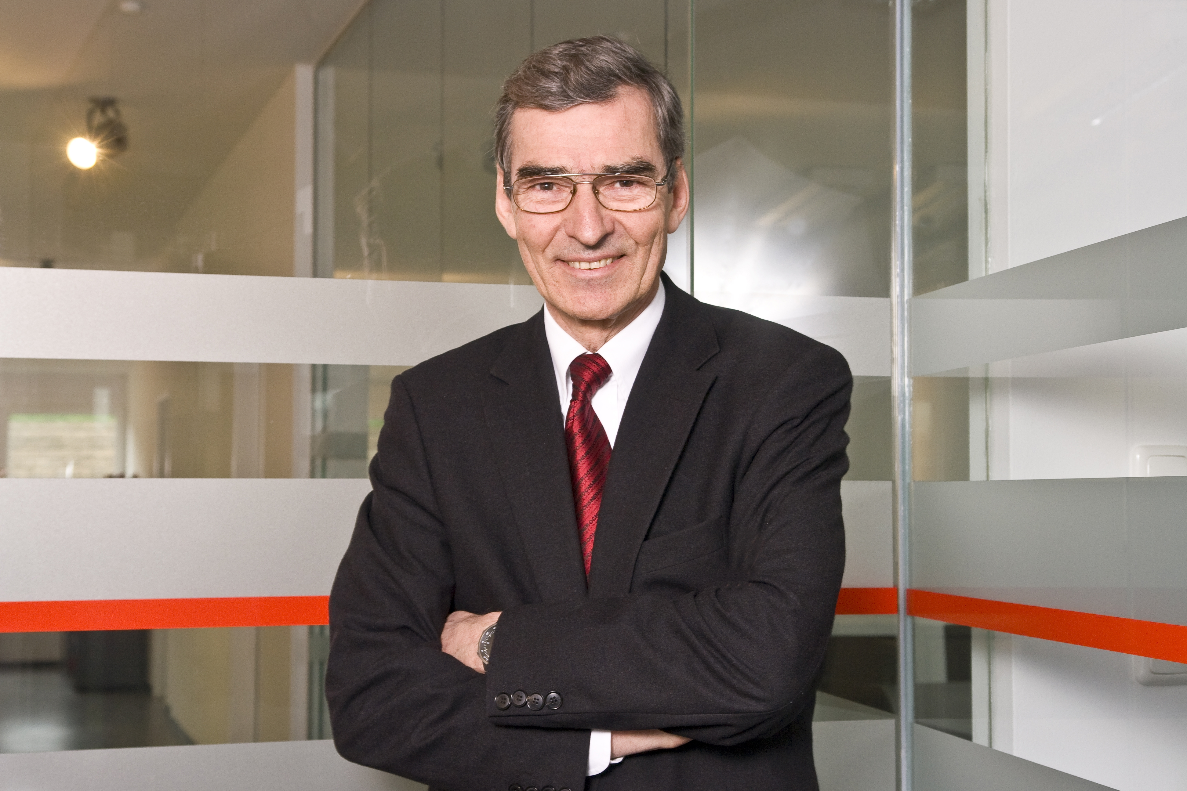 Karl Ochsner